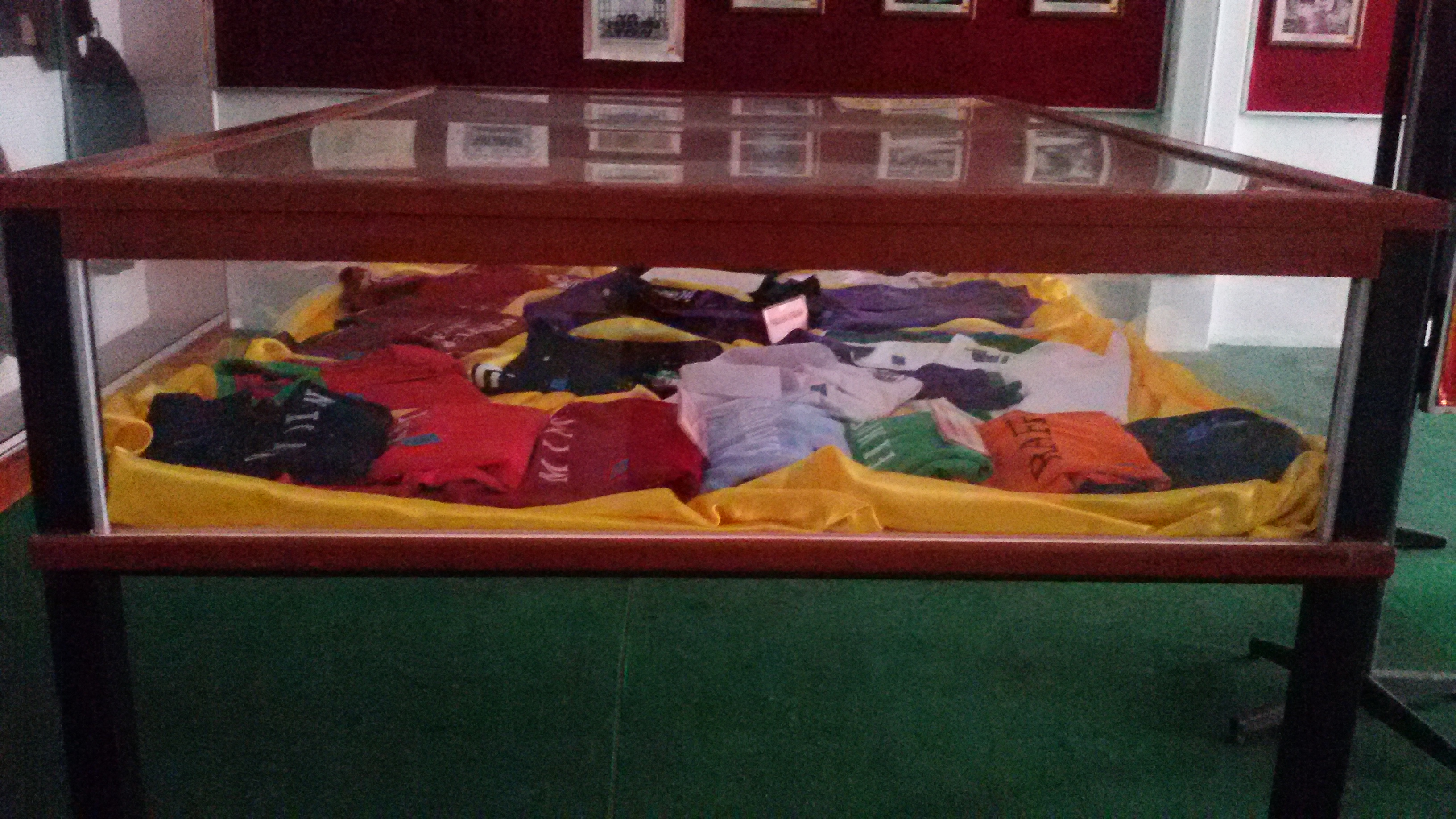 koleksi baju sukan dan baju rumah sukan